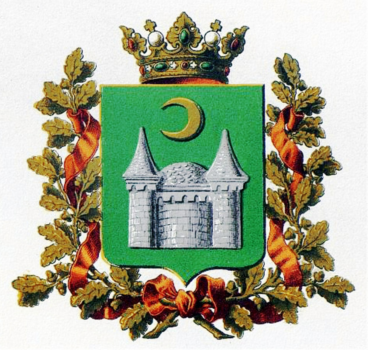 Official Russian Empire coat of arms Akmolinsk Oblast. Герб Российской Империи Акмолинской области в Гербовнике Министерства внутренних дел Российской Империи 1880 года. Утверждён Императором Всероссийским Александром Вторым в 1878 году.